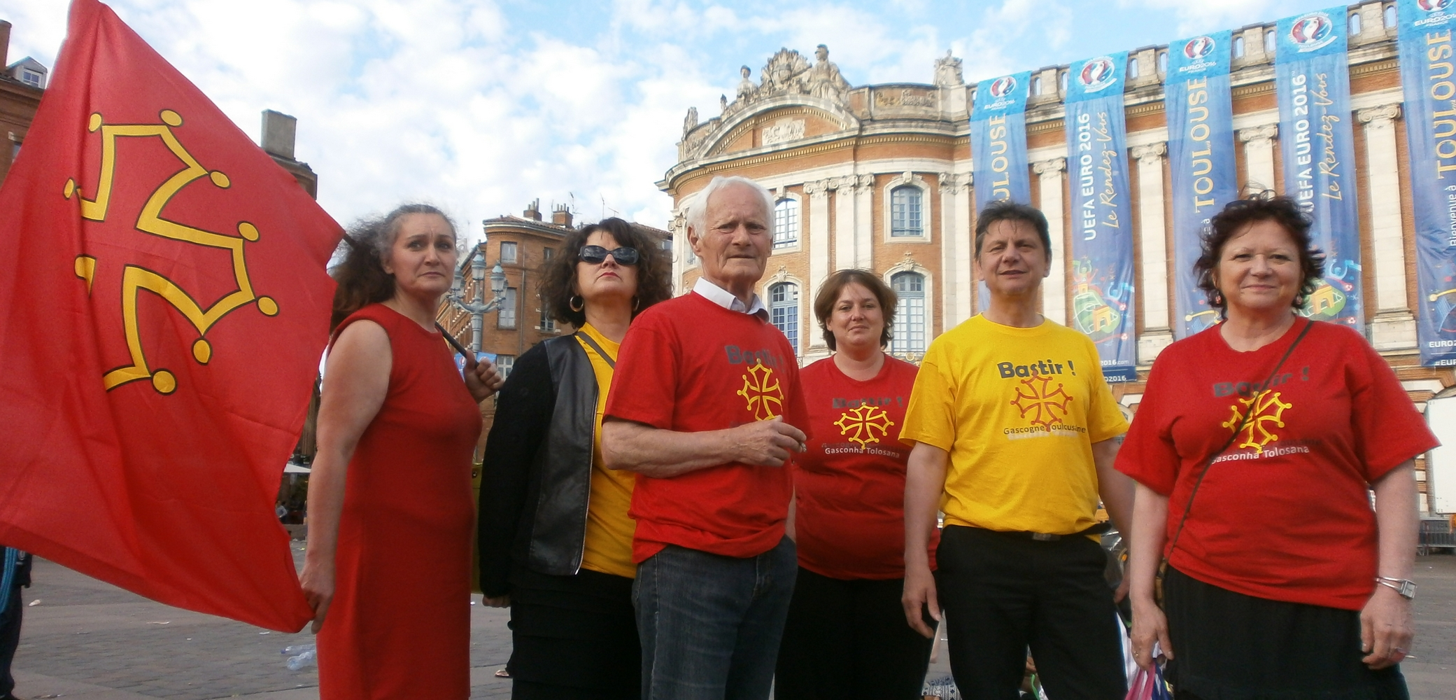 BASTIR OCCITANIE à Toulouse (2016)